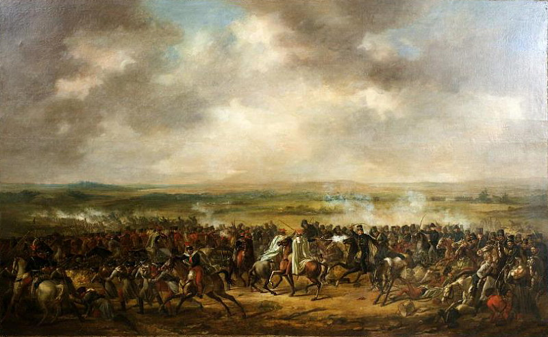 Sweden vs. Denmark.